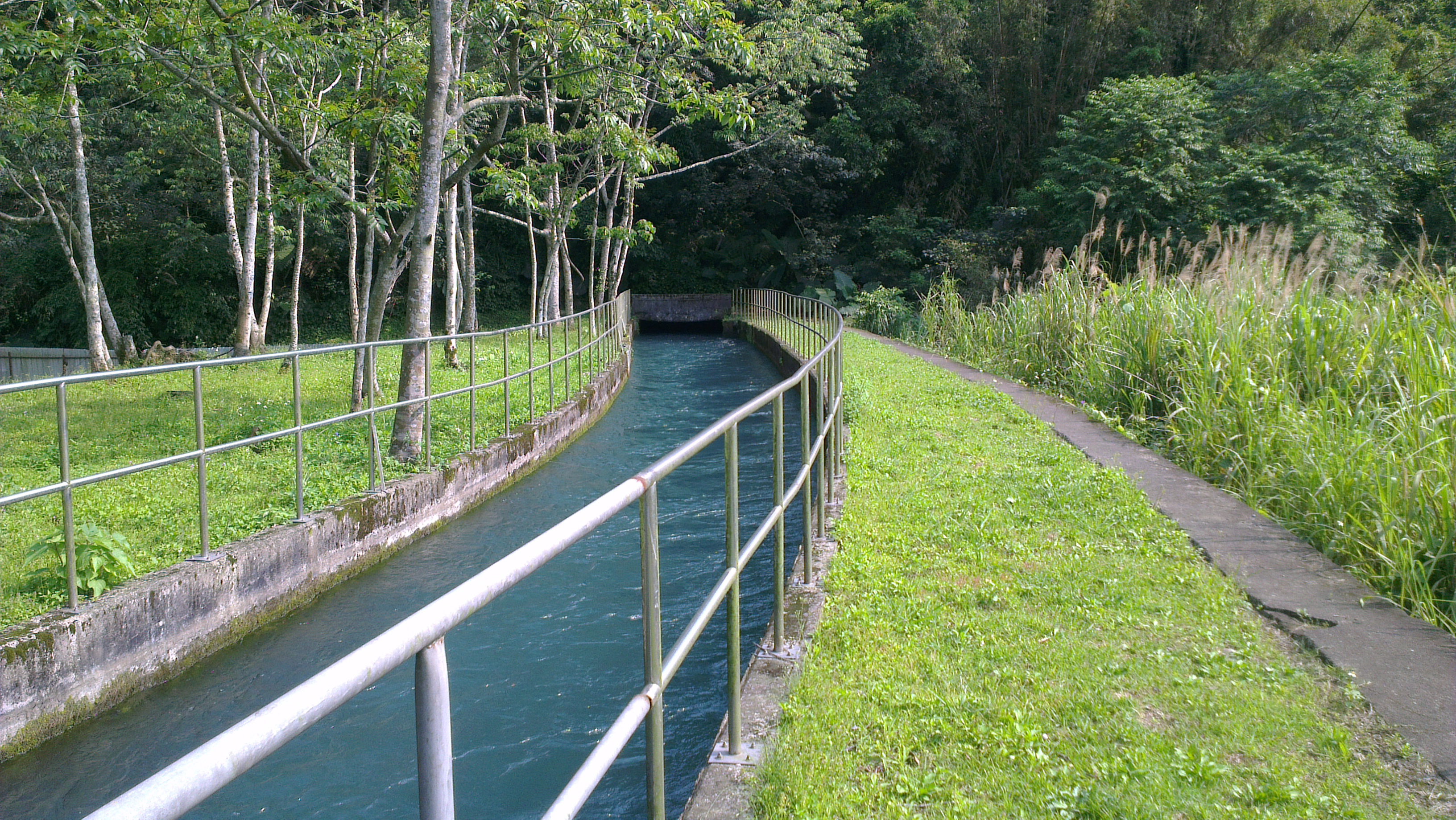 中文（台灣）: 石門大圳石門幹渠第1號隧道出口.jpg